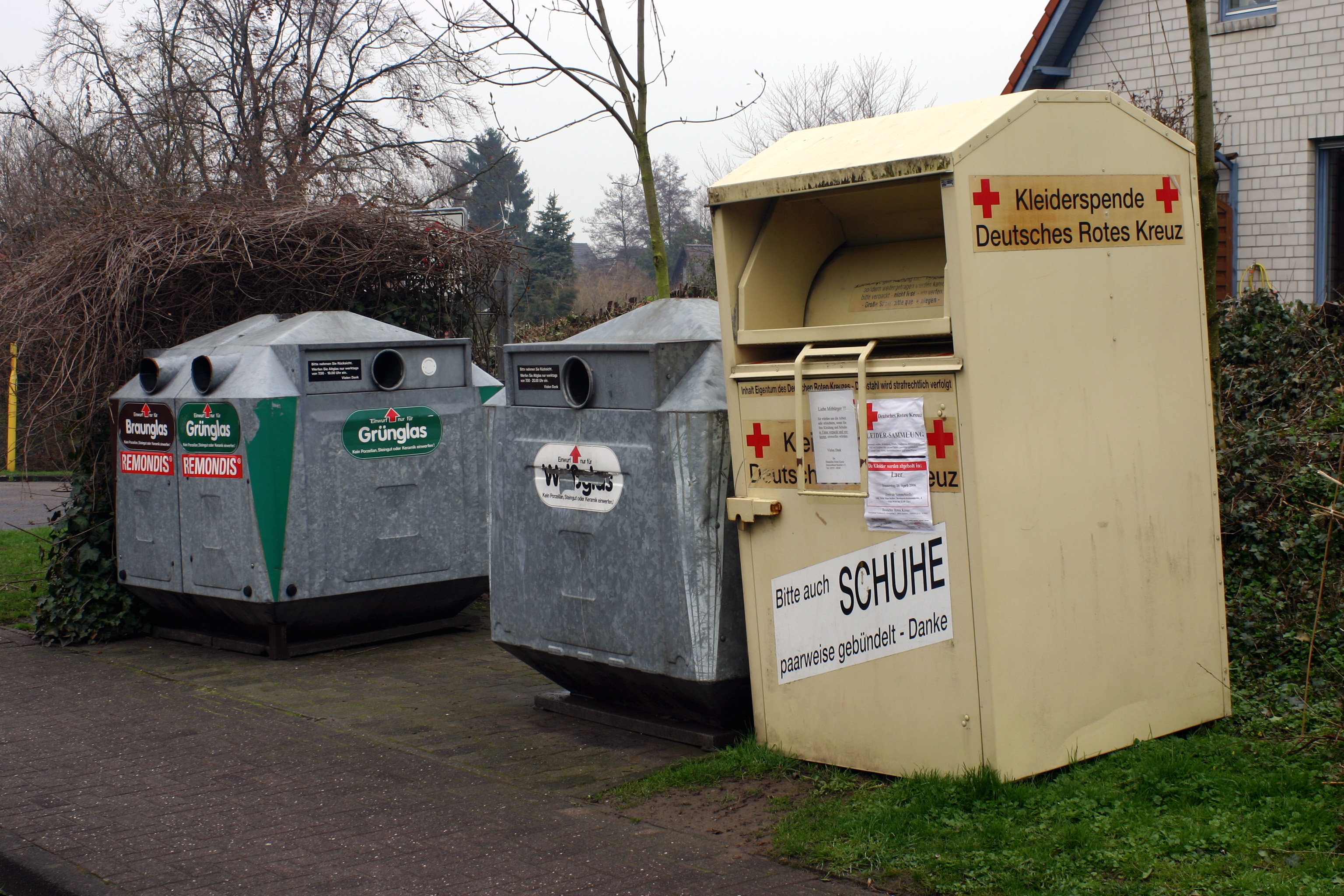 Altglascontainer und Container für die Altkleidersammlung im westfälischen Laer